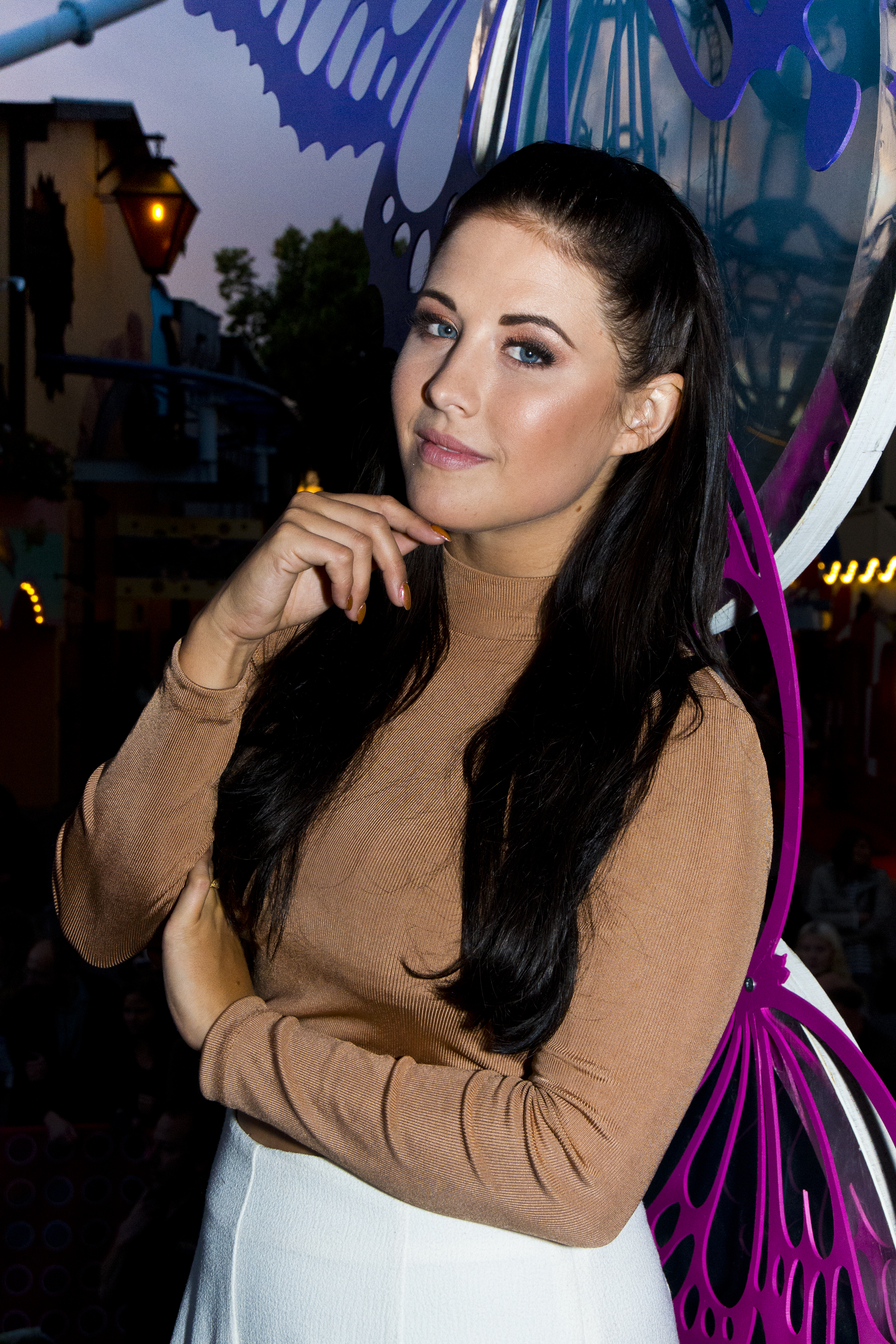 Molly Sandén På Sommarkrysset, Gröna Lund, Stockholm